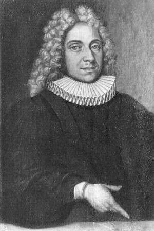 Johann Michael Heineccius (1674-1722) als Diaconus in Goslar (mit dem Goslarer Mühlsteinkragen)